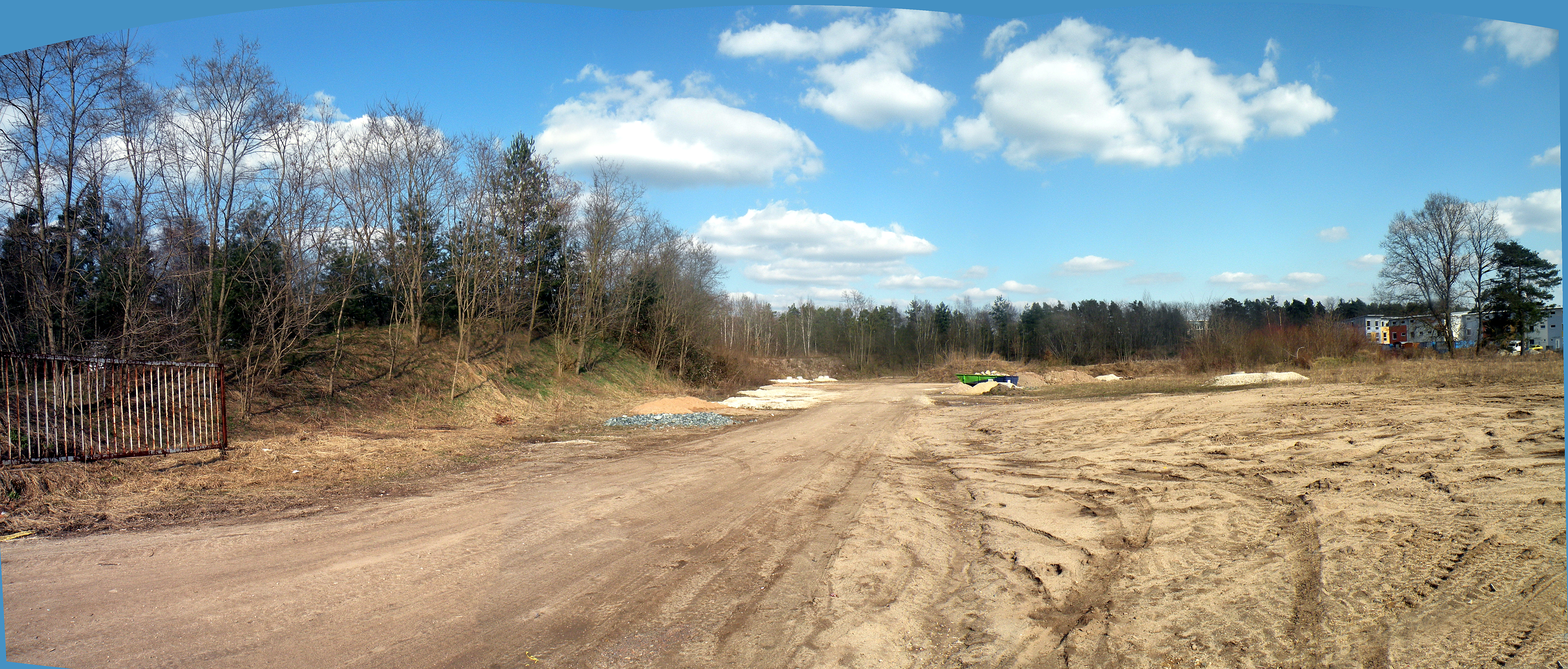 Северный_угол_Марсова_поля._2011_г